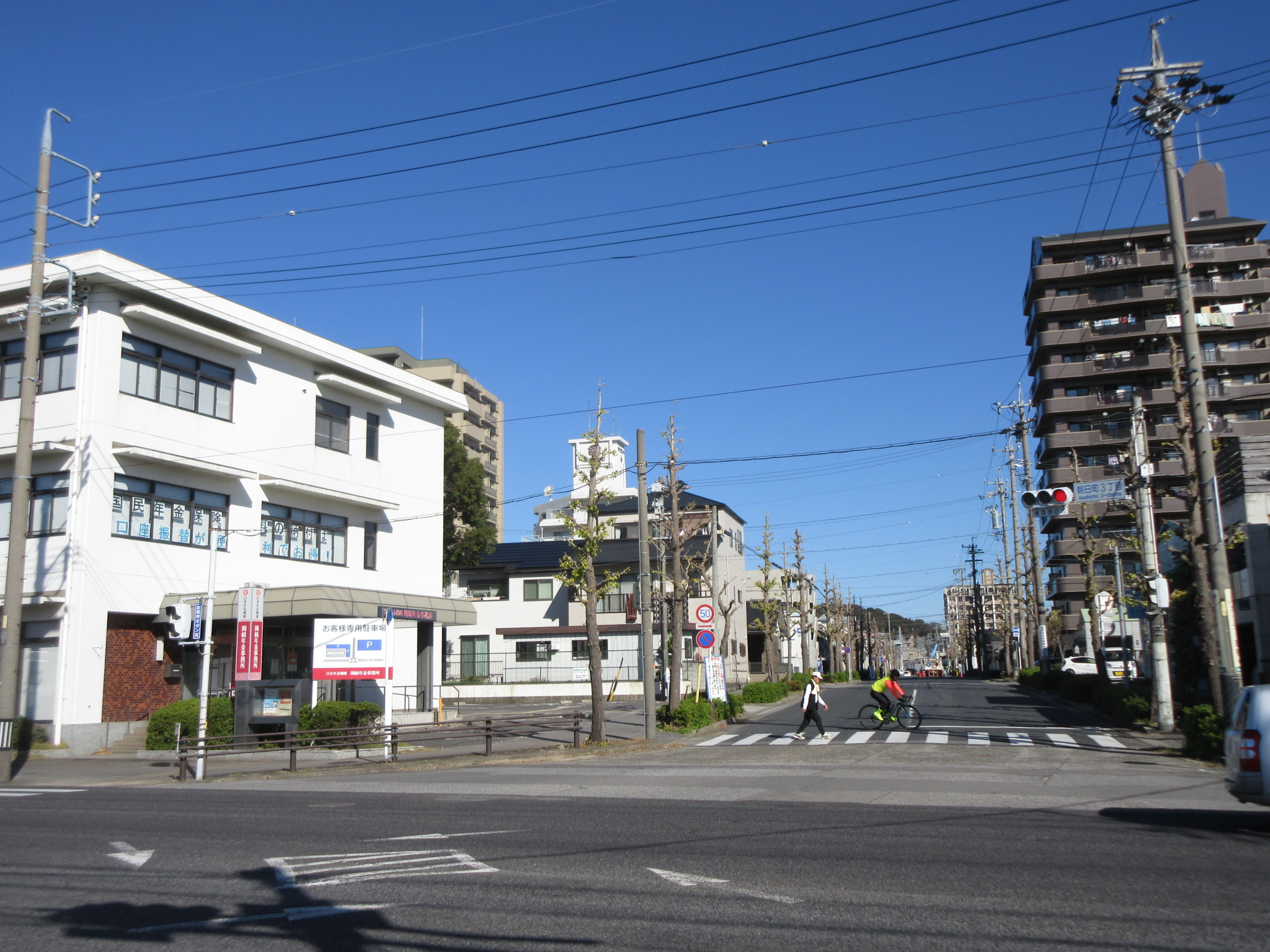 岡崎市朝日町3丁目交差点、岡崎年金事務所